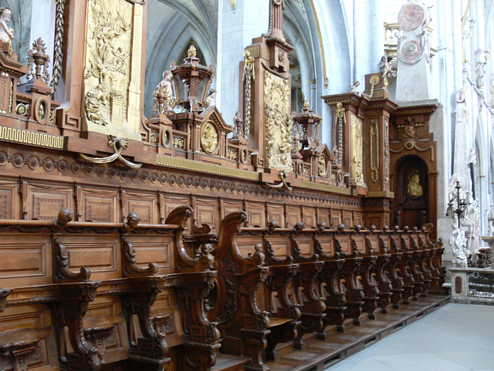 Salemer Münster, Salem (Baden), Germany: Chorgestühl (rechts)